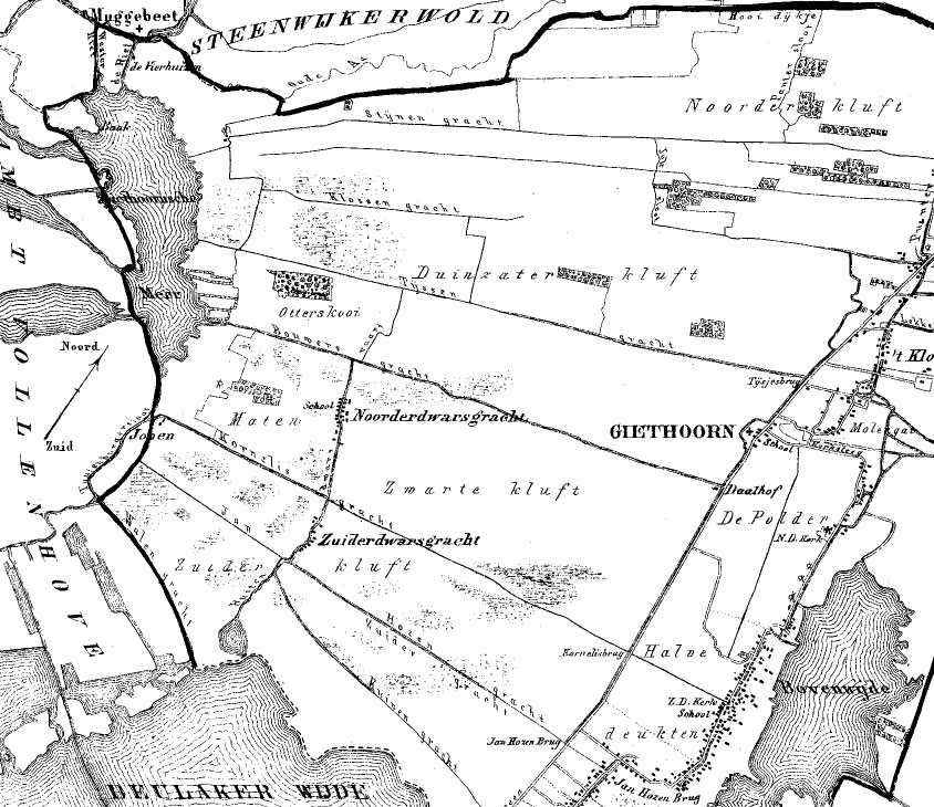 Uitsnede van de kaart van Giethoorn